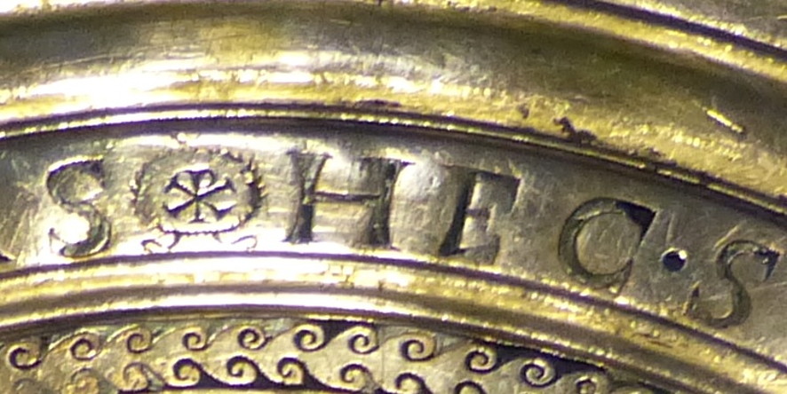 Vadásztál. Seuso kincs. Krisztogram. A felvétel 2017. július 17-én, hétfőn készült az Országházban. Vadásztál. Lapos ezüsttál, átmérője 70,5 cm, tömege 8,8 kg. A tál közepén vadászati jelenetekkel közrefogott szabadtéri lakomajelenet. Kör alakú mezőbe foglalt díszítését latin nyelvű verses felirat keretezi. Seuso a kincs tulajdonosa lehetett aki jelentős családi esemény, talán mennyegző alkalmával kaphatta ajándékba ezt a tárgyat. A vadásztársaság egy halban gazdag Balaton partján lakomázik. A víz felett Pelso (Balaton). A tál a 4. század közepe táján készülhetett. Seuso, Pannonia helytartója birtokának széle a legközelebbi Balatonpart a Partfő, Balatonkenesén.